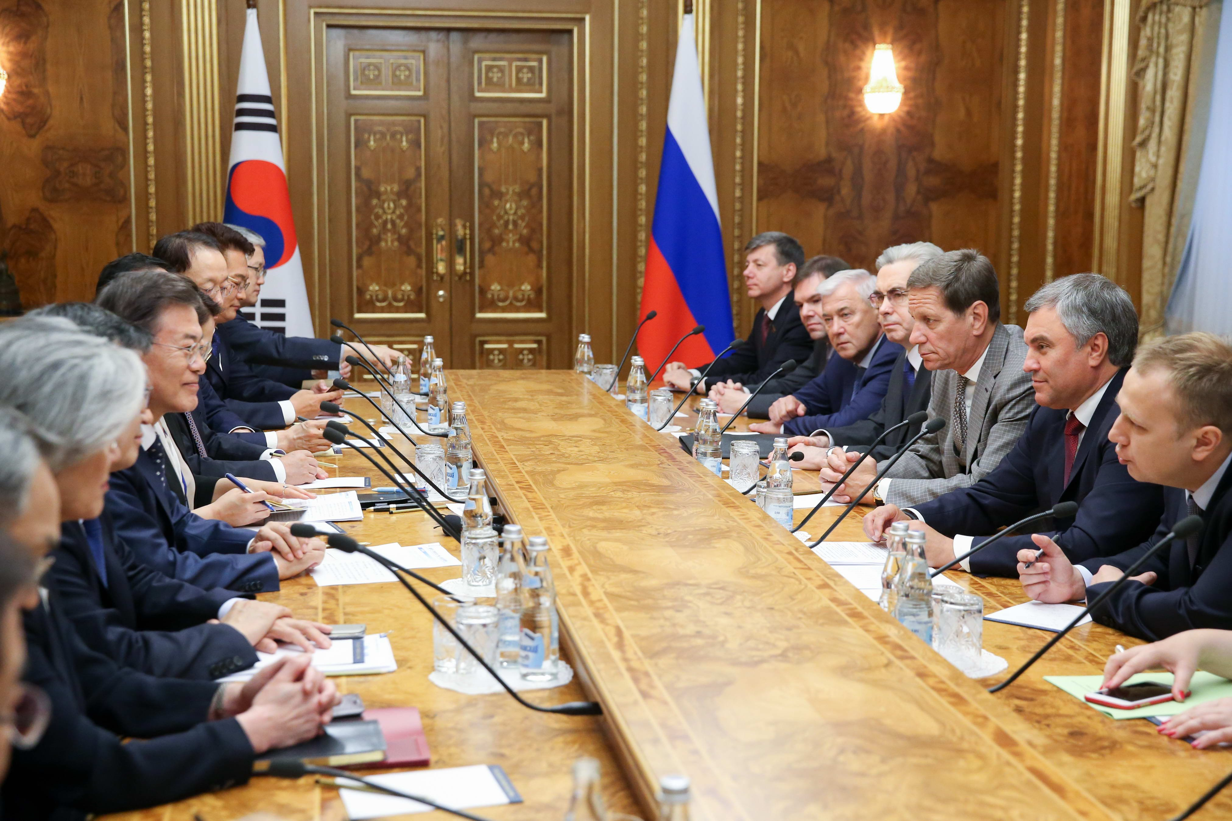 Moon Jae-in in the Russian State Duma (2018-06-21)